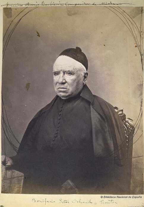 Bonifacio Sotos Ochando, fotografía en papel a la sal. Biblioteca Nacional de España.